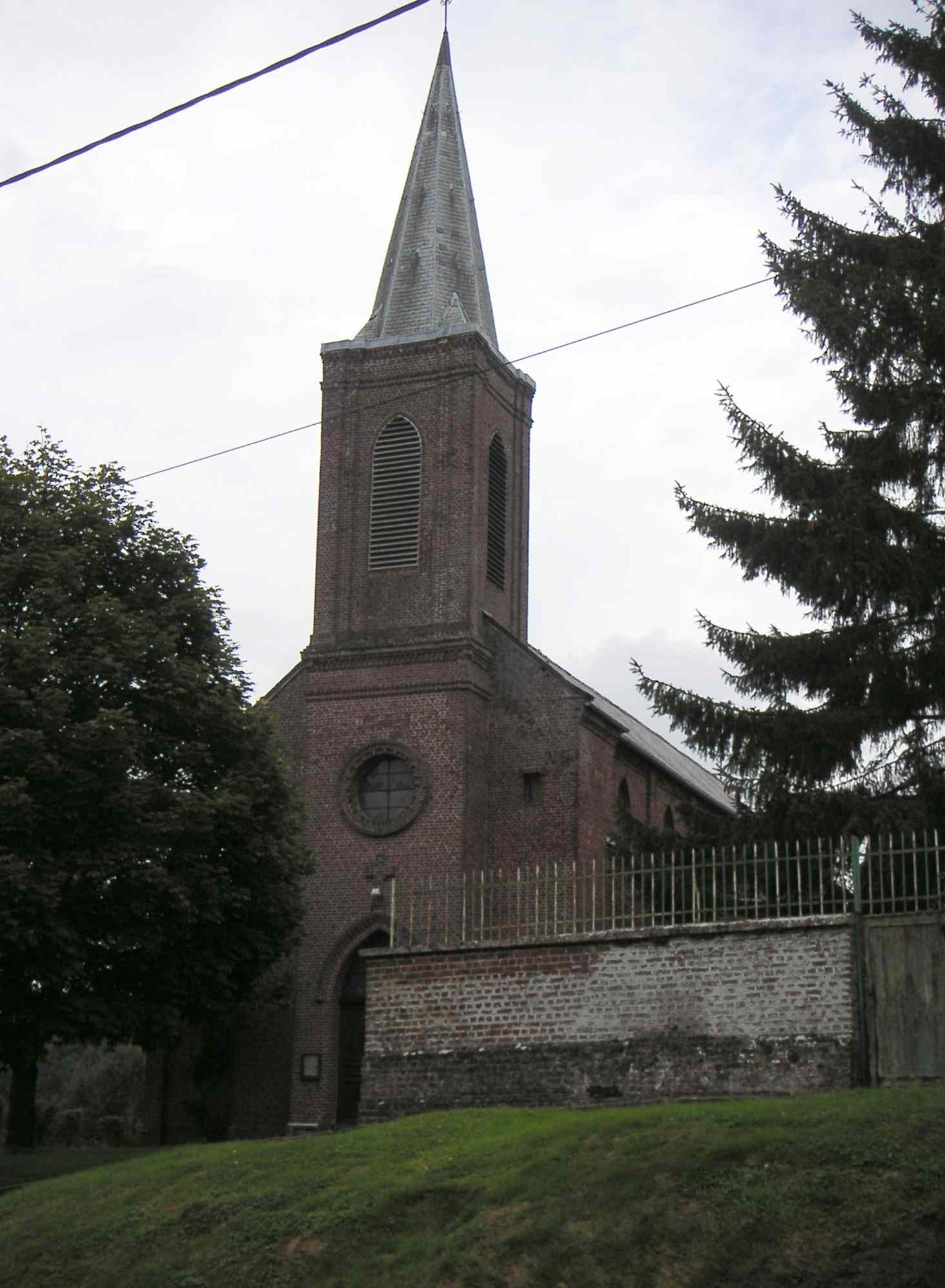 Photo de l'église de Le Sourd (Aisne) prise par User:LonganimE le 01/sept/2005.